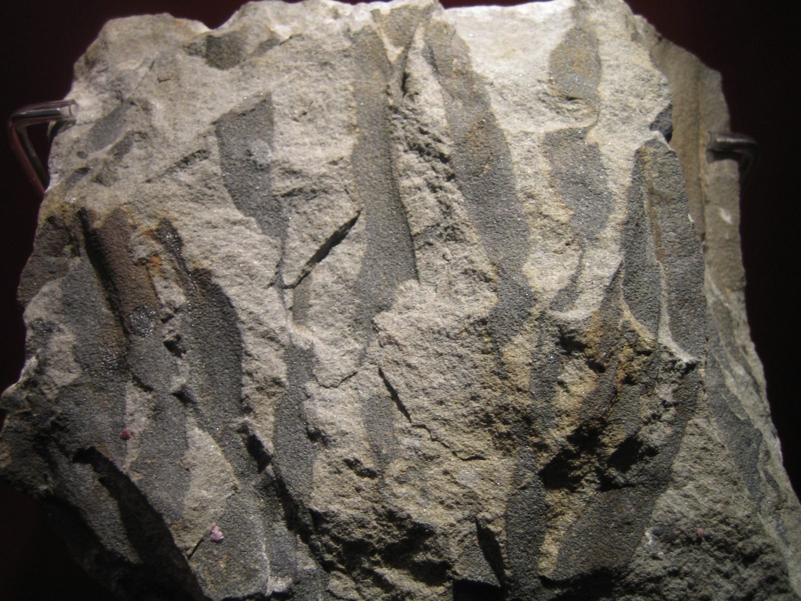 Eospermatopteris erianus fossil roots, in CosmoCaixa, Barcelona.